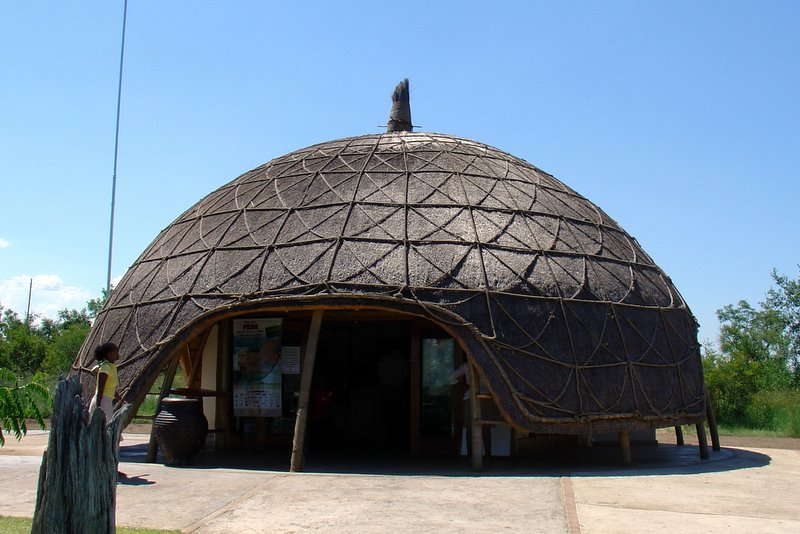 Eie foto. Phabeni, Nasionale Krugerwildtuin.